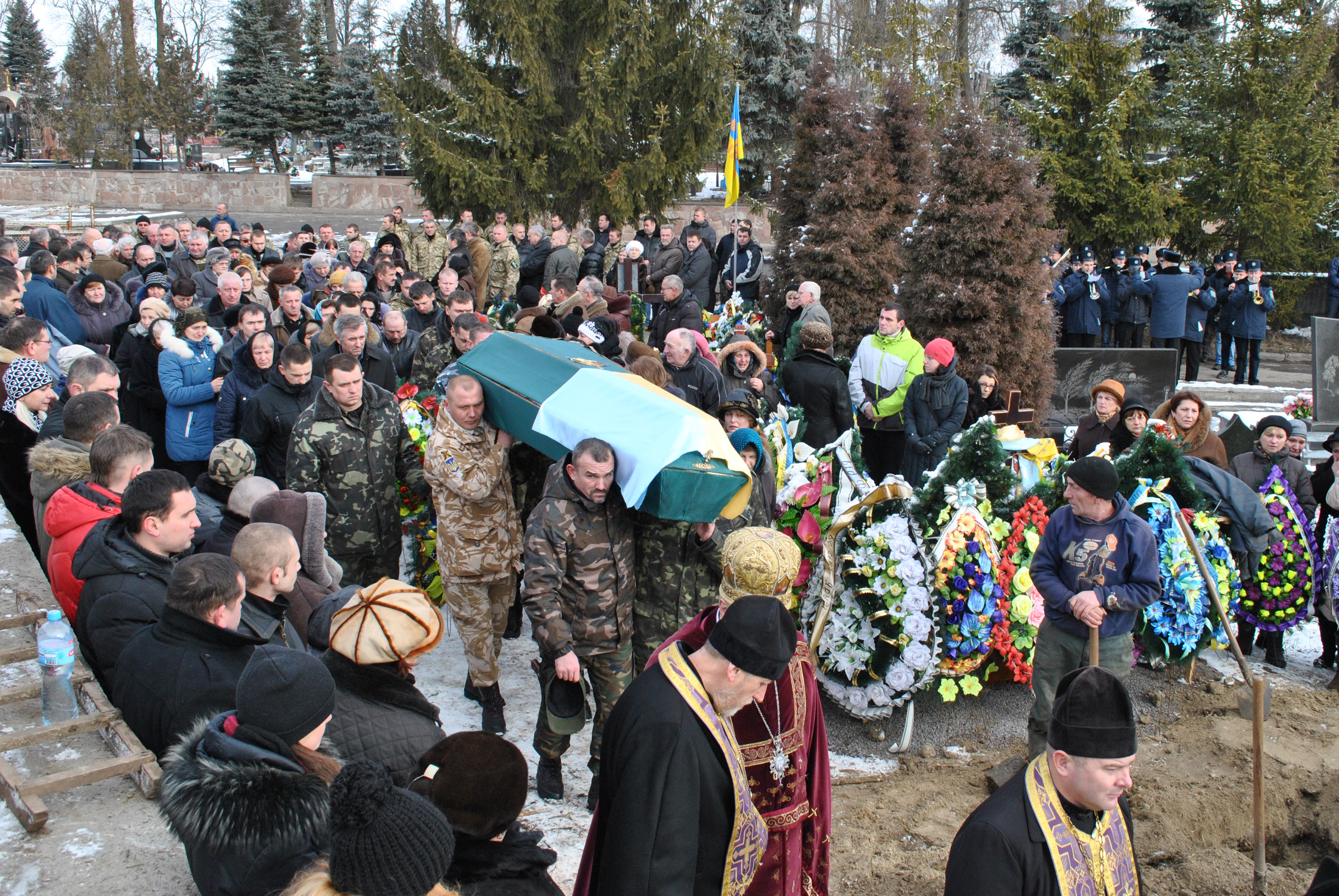 Похорон військовослужбовця 6-го БТО Тернопільської області «Збруч», уродженця м. Тернополя Назарія Сикліцького на Микулинецькому цвинтарі 6 лютого 2015 року.